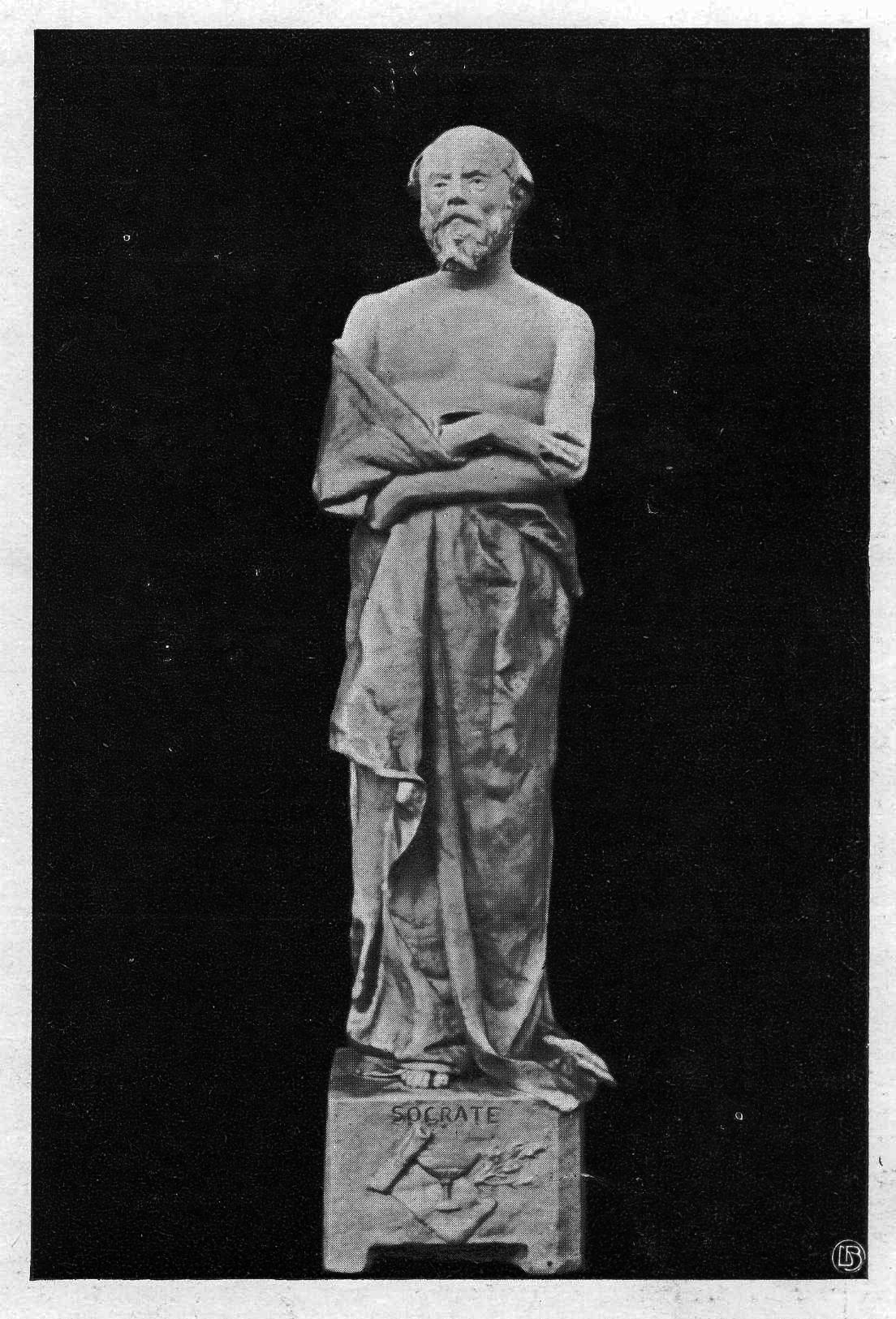 Socrate devant ses juges (terre cuite) par Renzo Colombo. Exposé à Paris au Salon des Artistes Français (1884), n°3389.